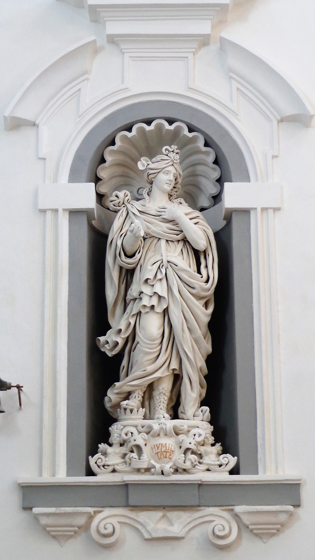 Scultura di Virtù Morale Umiltà di Cristoforo Milanti.